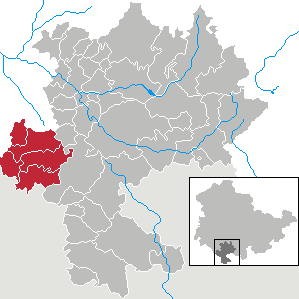 Verwaltungsgemeinschaft Gleichberge in Thuringia - district Hildburghausen